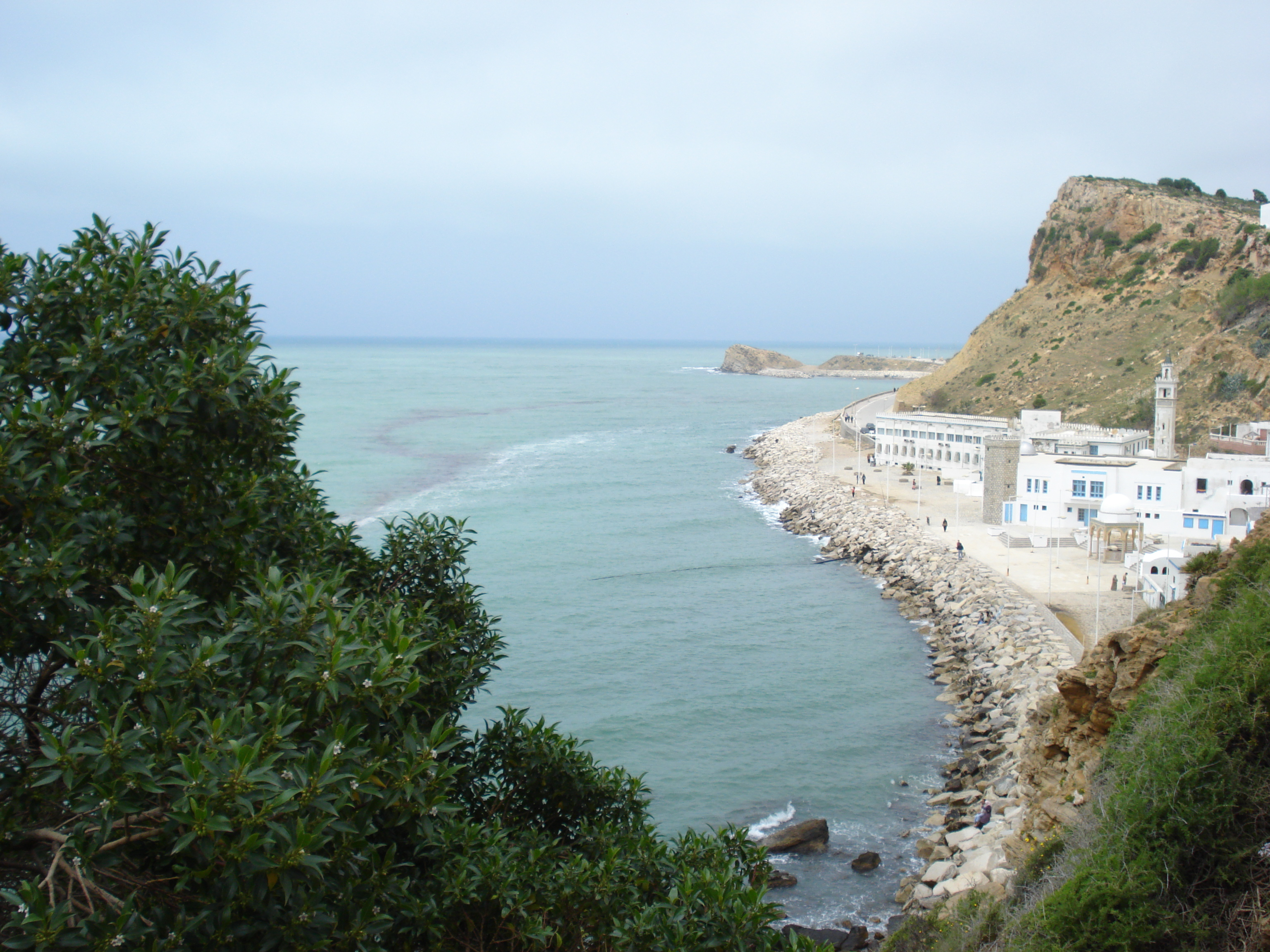 مدينة قربص، الوطن القبلي، تونس